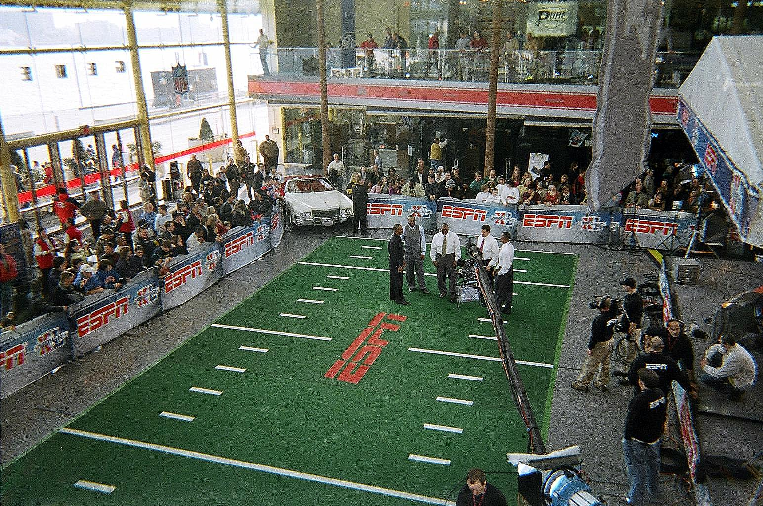 self made